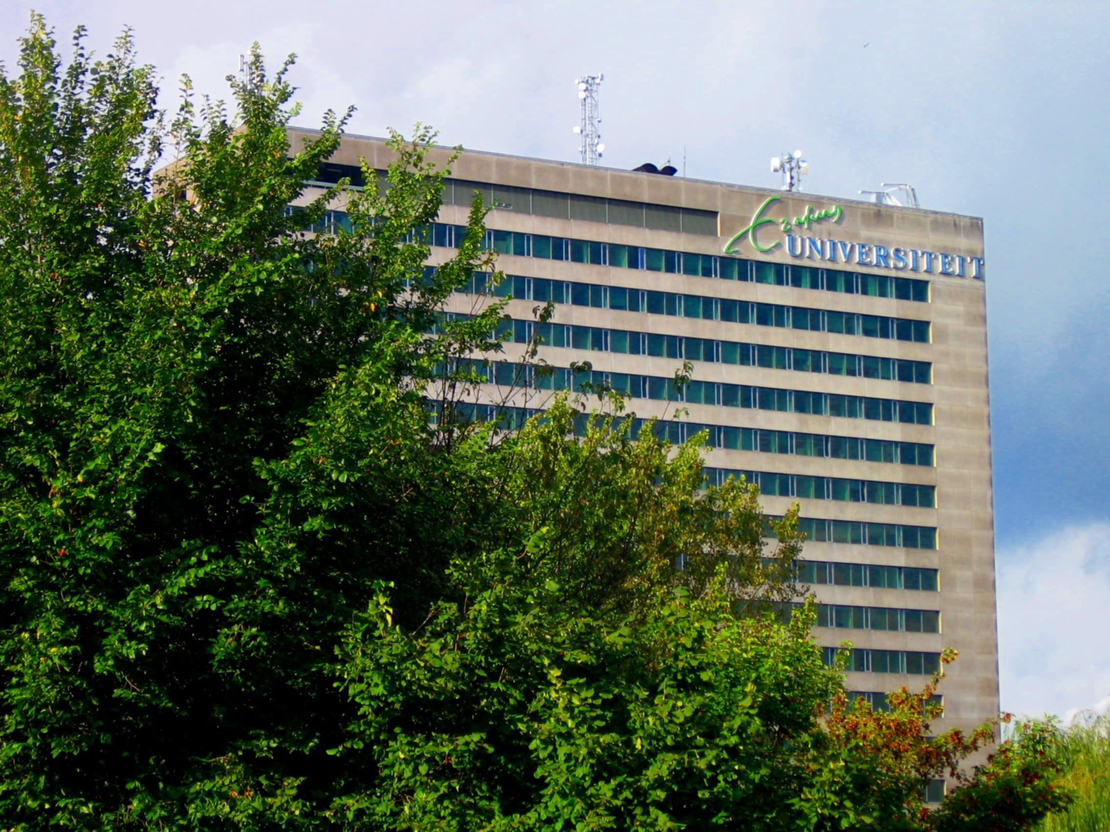 Erasmus universiteit Woudestein bekeken vanaf de Kralingse Zoom. (Original text: Erasmus universiteit Woudestein)